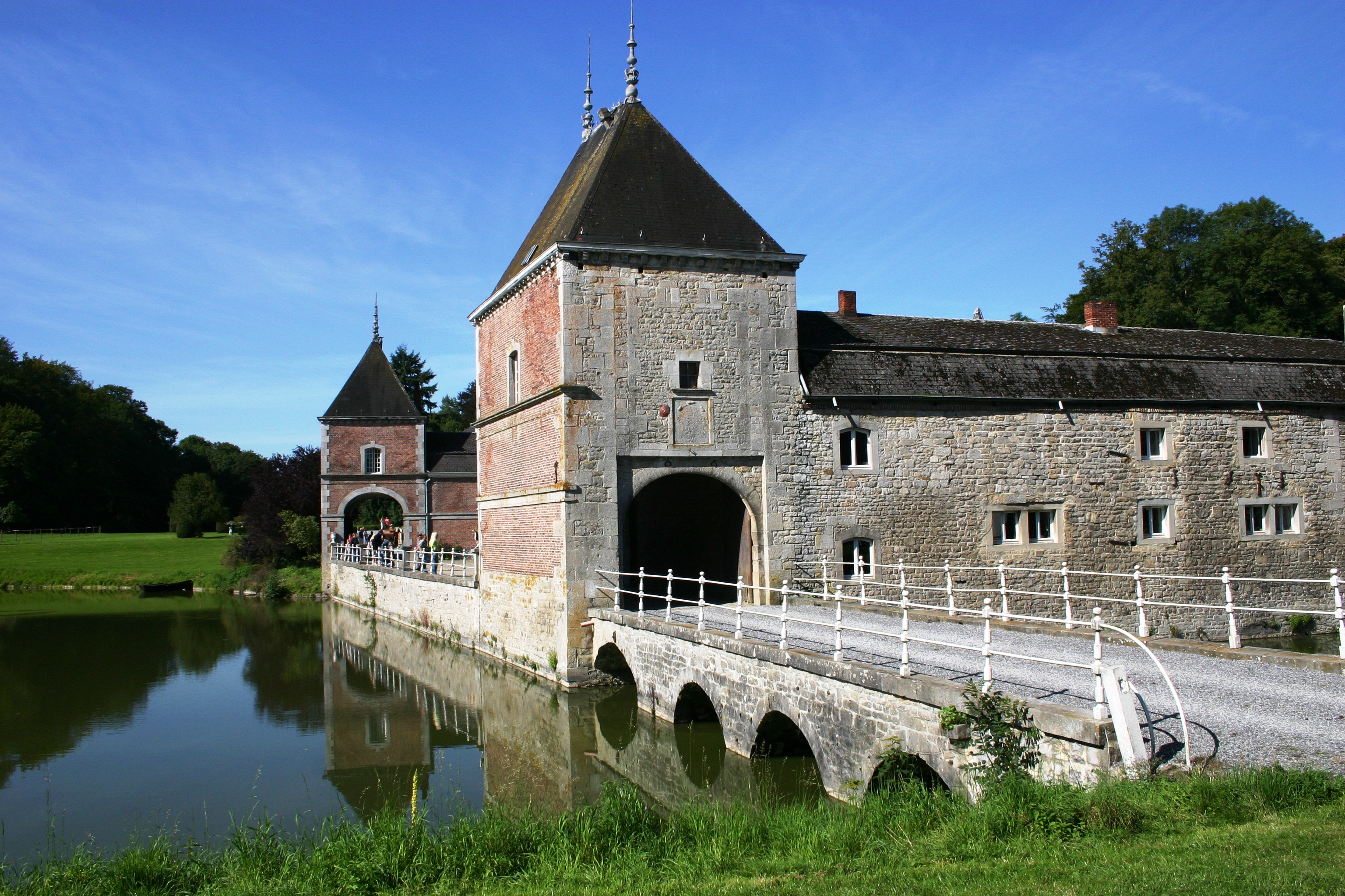 Schlass Barvaux d'Bréck an de Gruef vun Oste gesinn.